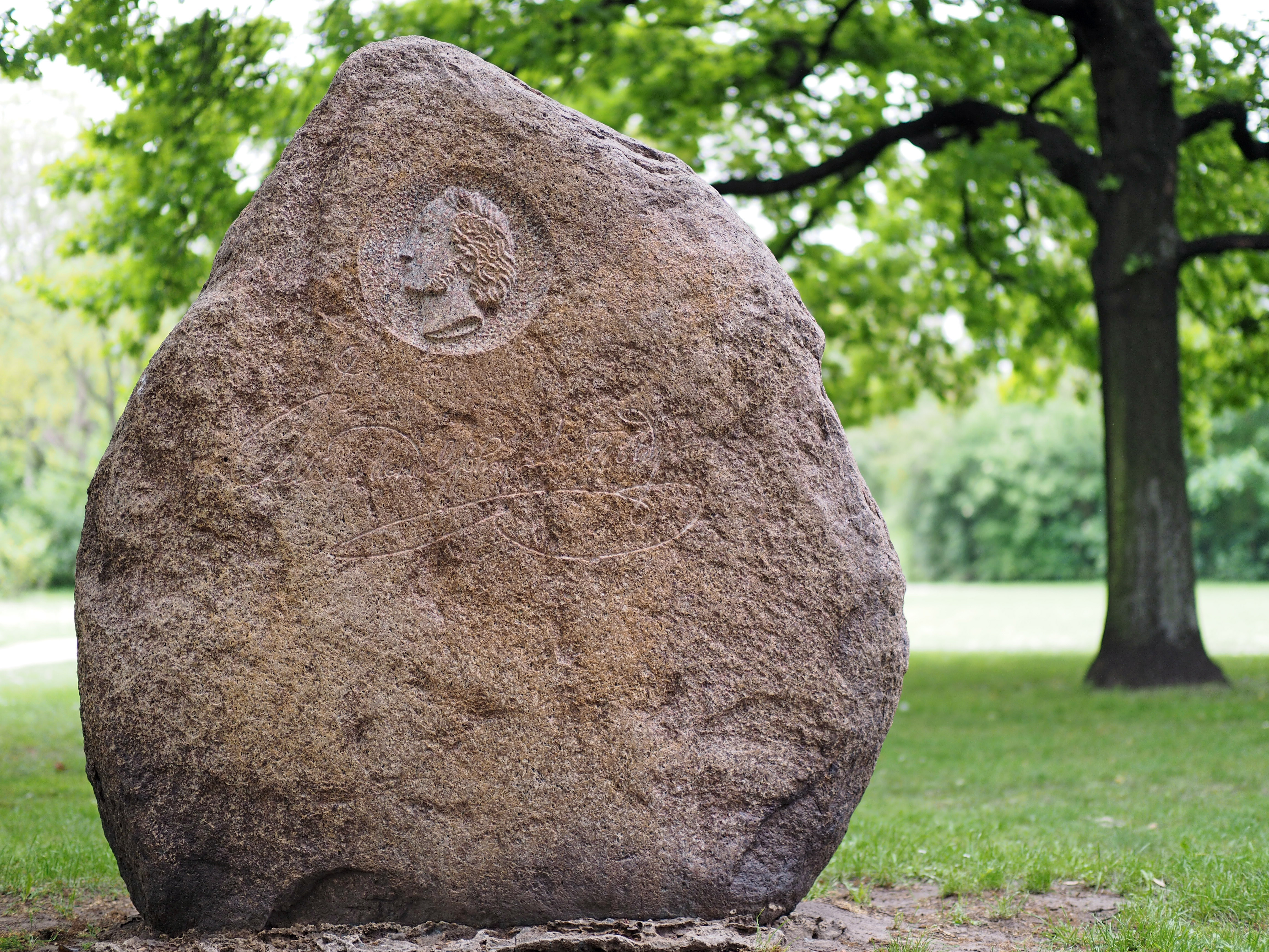 Naturdenkmal, 2-1/F, Findling, Felix-Mendelssohn-Bartholdy-Stein im Mendelssohn-Bartholdy-Park in Berlin